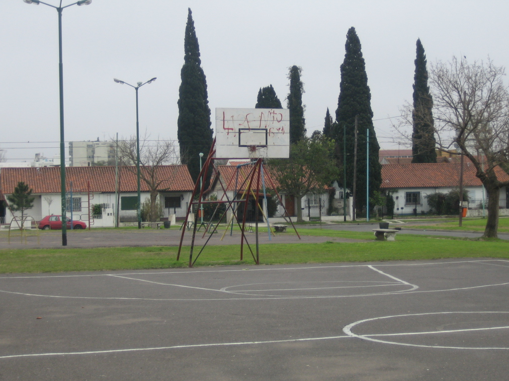 Plaza de la calle Valdenegro en el barrio Presidente Roque Saenz Peña perteneciente a su vez al barrio de Saavedra - Ciudad de Buenos Aires